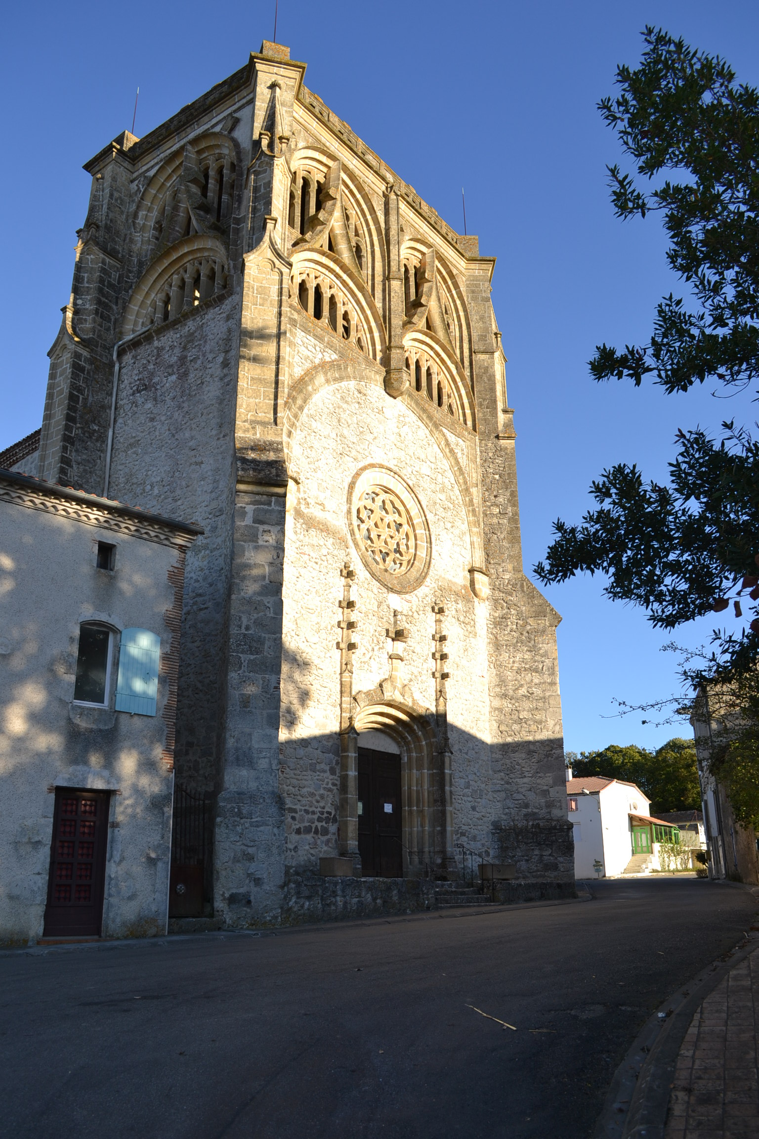 eglise de Lagarrigue en lot et garonne